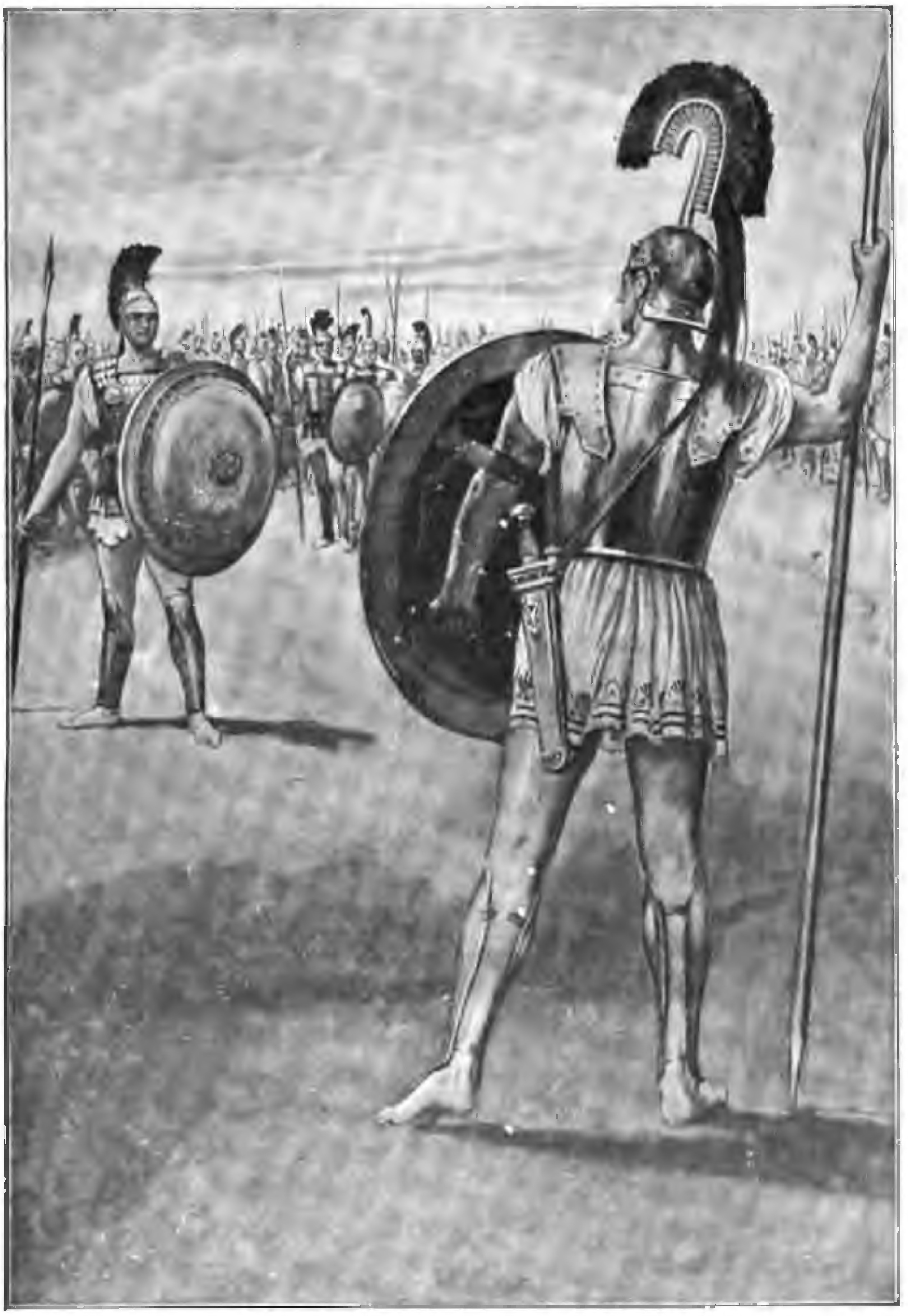 La Ilíada (Luis Segalá y Estalella)